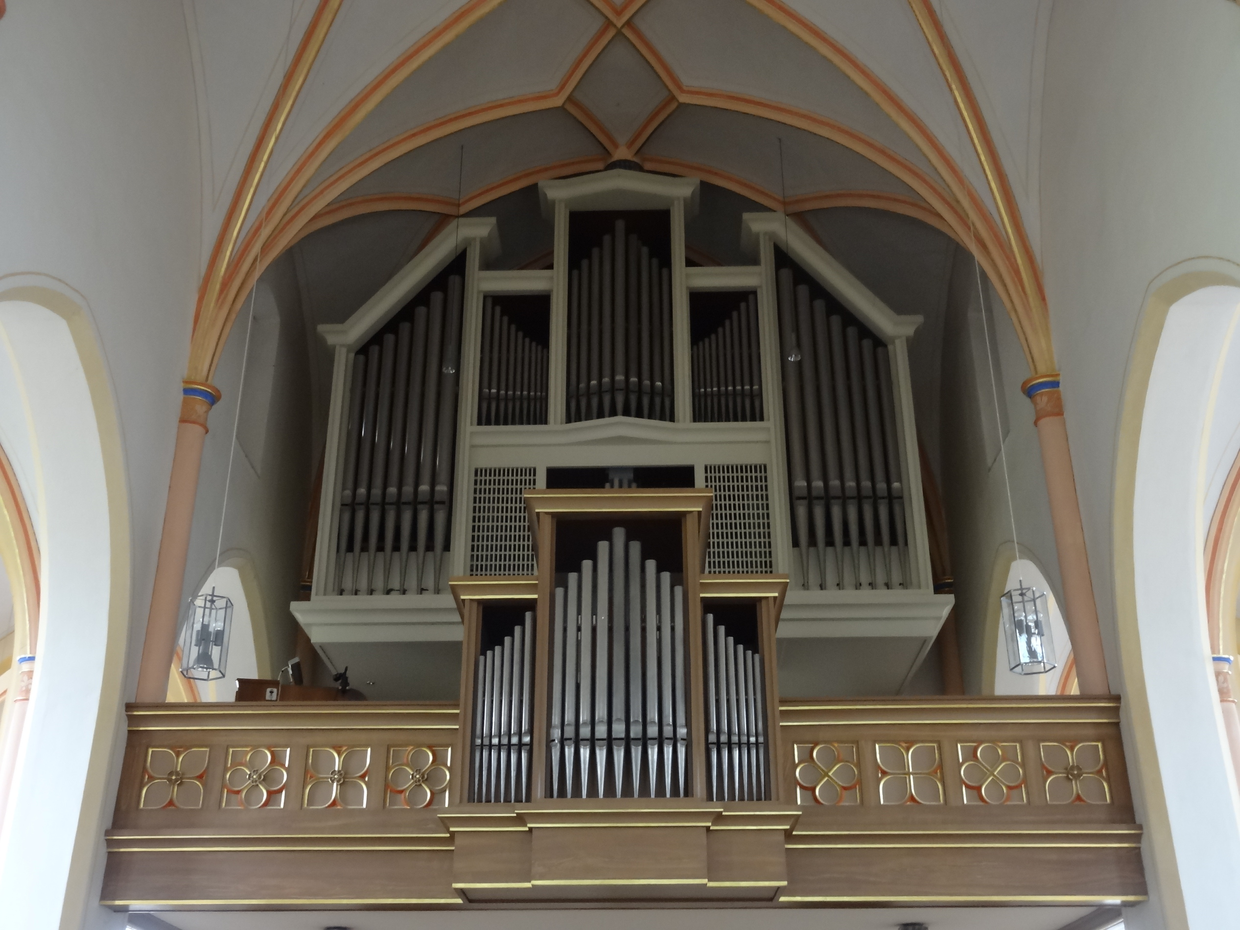 Orgel der kath. Pfarrkirche Mariä Himmelfahrt in Bonbruck (Gde. Bodenkirchen, Lkr. Landshut, Bayern)